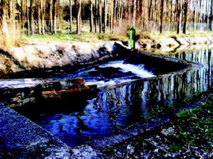 Vista del río Tajuña, a su paso por el pueblo de Luzaga. User:Carlosblh